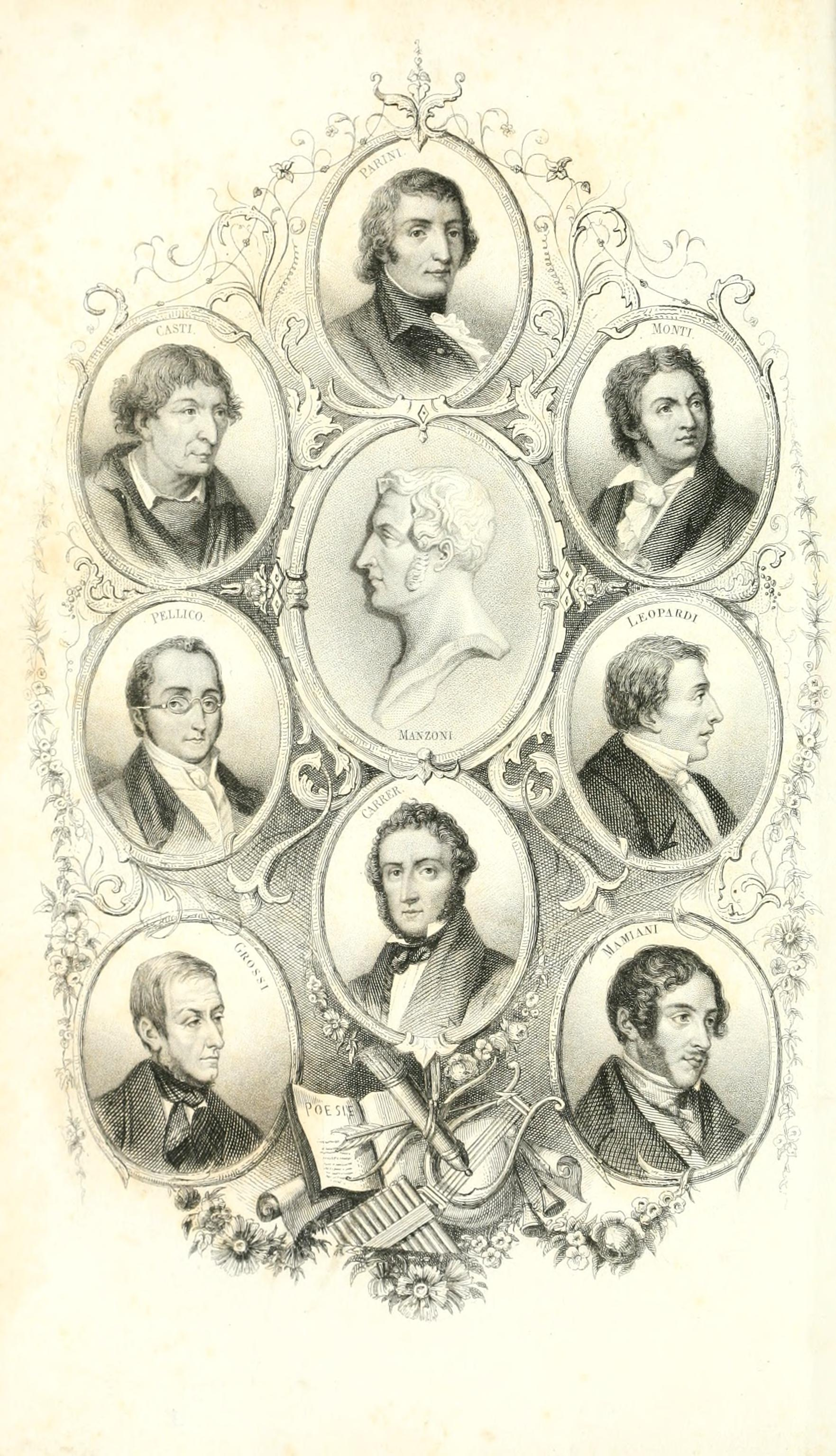 Dall'alto, in senso orario: Giuseppe Parini, Vincenzo Monti, Giacomo Leopardi, Terenzio Mamiani, Luigi Carrer, Tommaso Grossi, Silvio Pellico, Giovanni Battista Casti, Alessandro Manzoni.